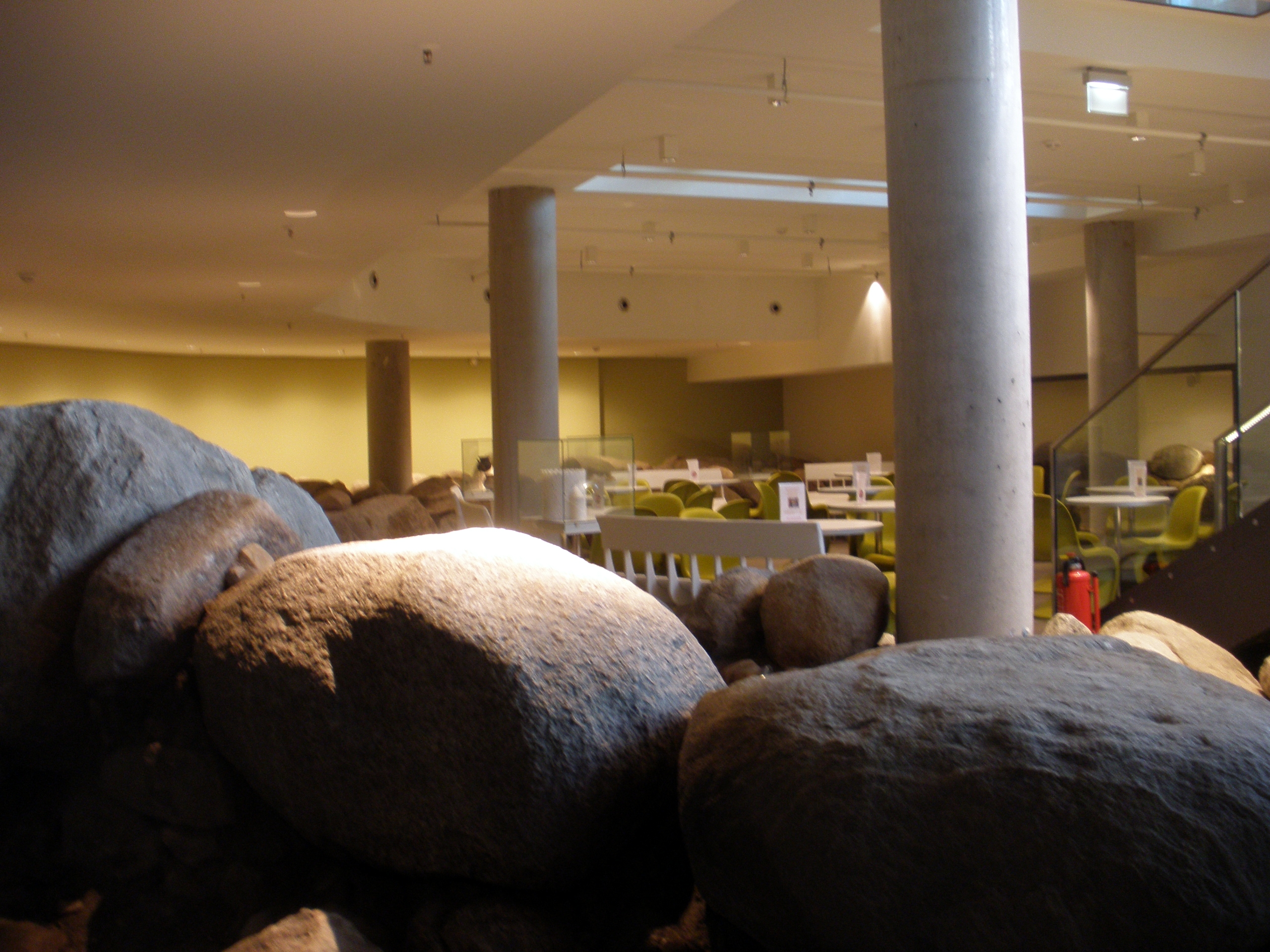 bischofsturm in hamburg, schauraum mit caféThis is a photograph of an architectural monument.